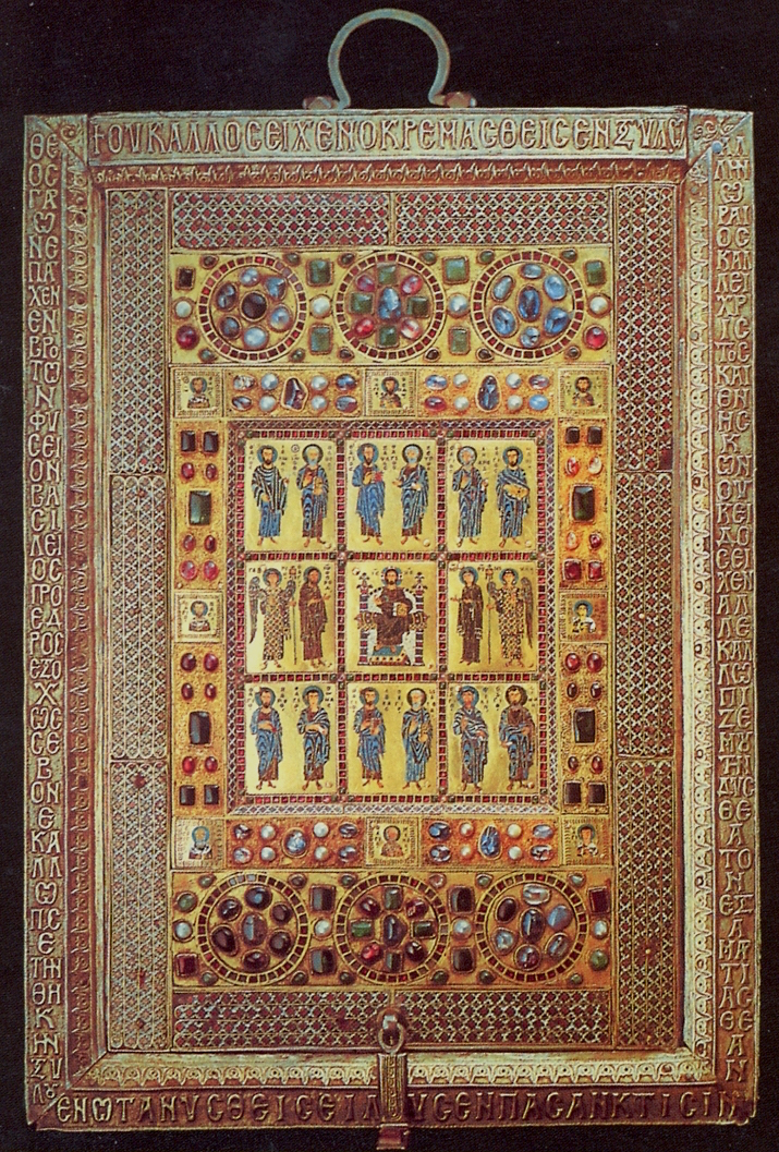 Staurothèque de Limbourg. Couvercle